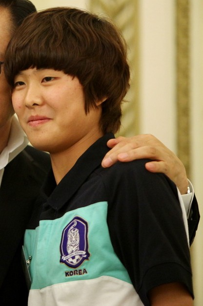 President Lee Myung-bak and Ji So Yun